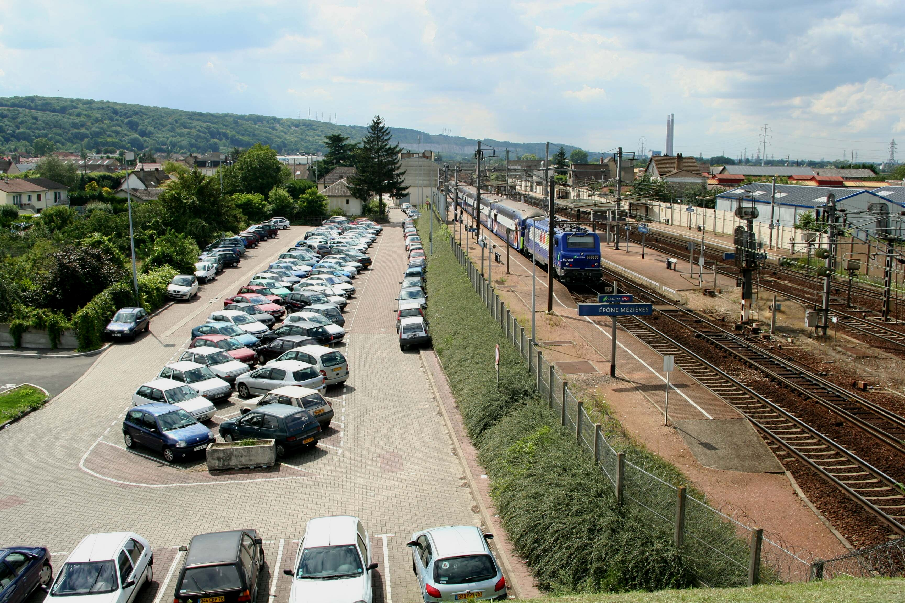 Parc de stationnement et gare à Épône, Yvelines (France)